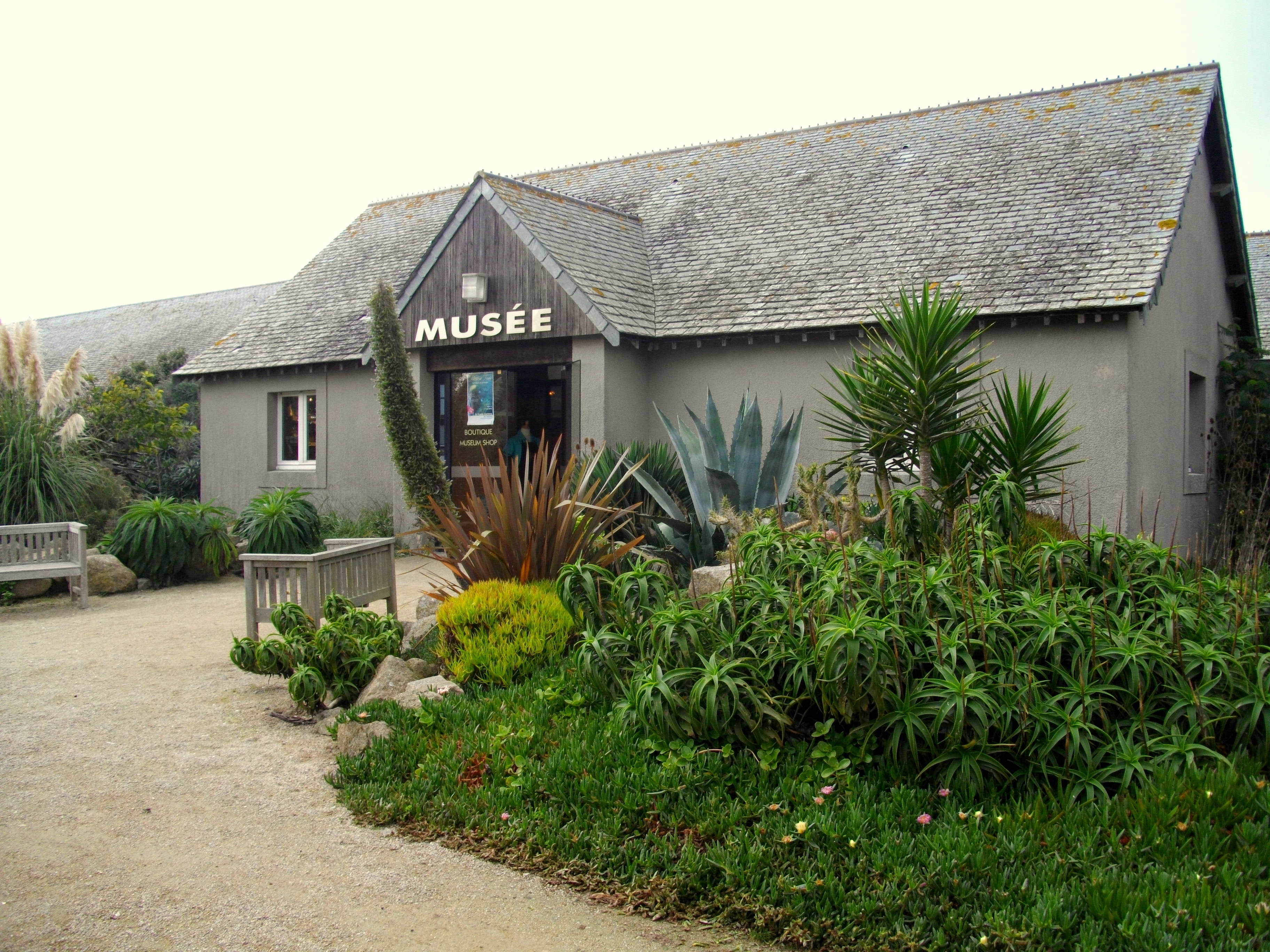 Entrée du Musée (Ile de Tatihou) St Vaast-la_Hougue